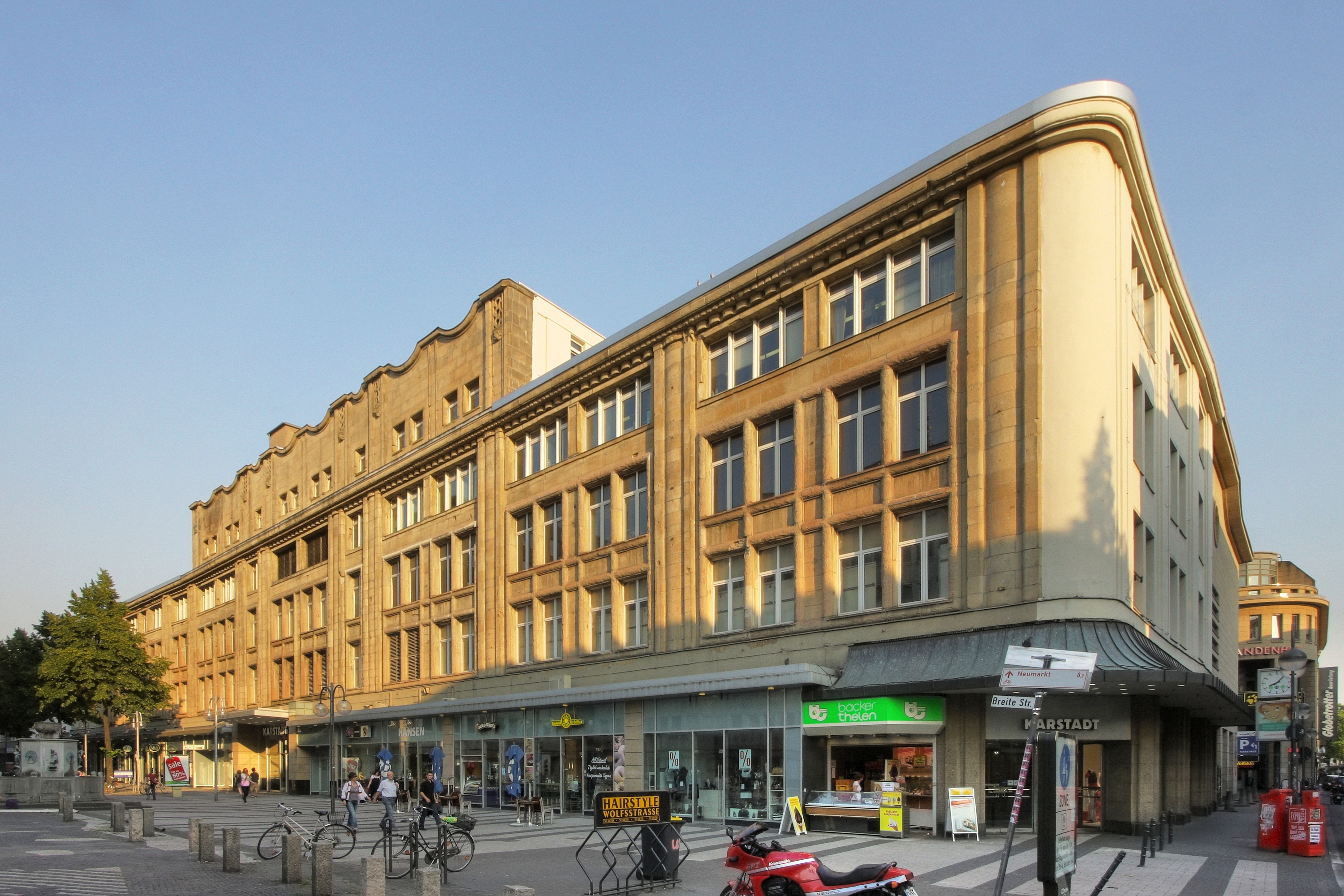 Karstadt, Breite Straße, Köln. Ehemals Kaufhaus C. Peters. Die ursprüngliche Werkstein-Fassade ist nur noch an der Breite Straße erhalten. Architekt: Carl Moritz, Baujahr: 1911-14.